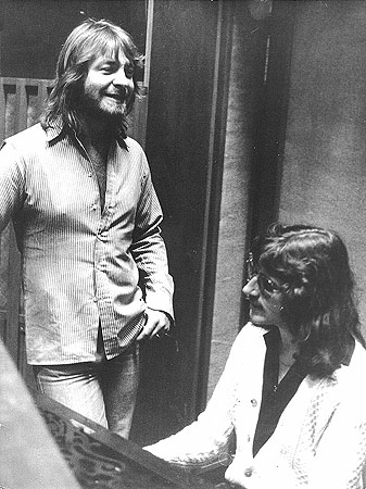 Foto de León Gieco y Charly García.